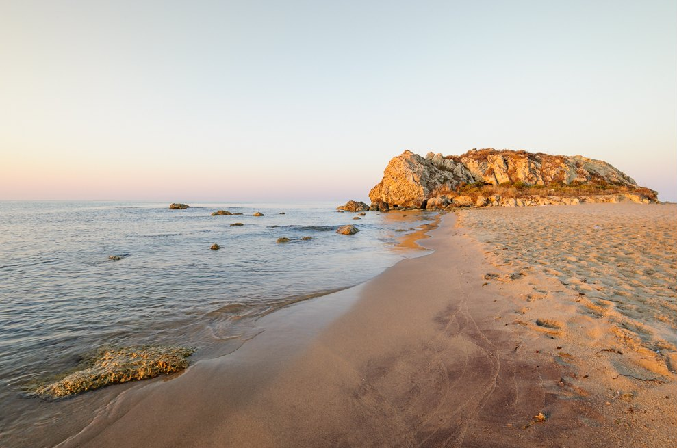 Falconara, Sicily